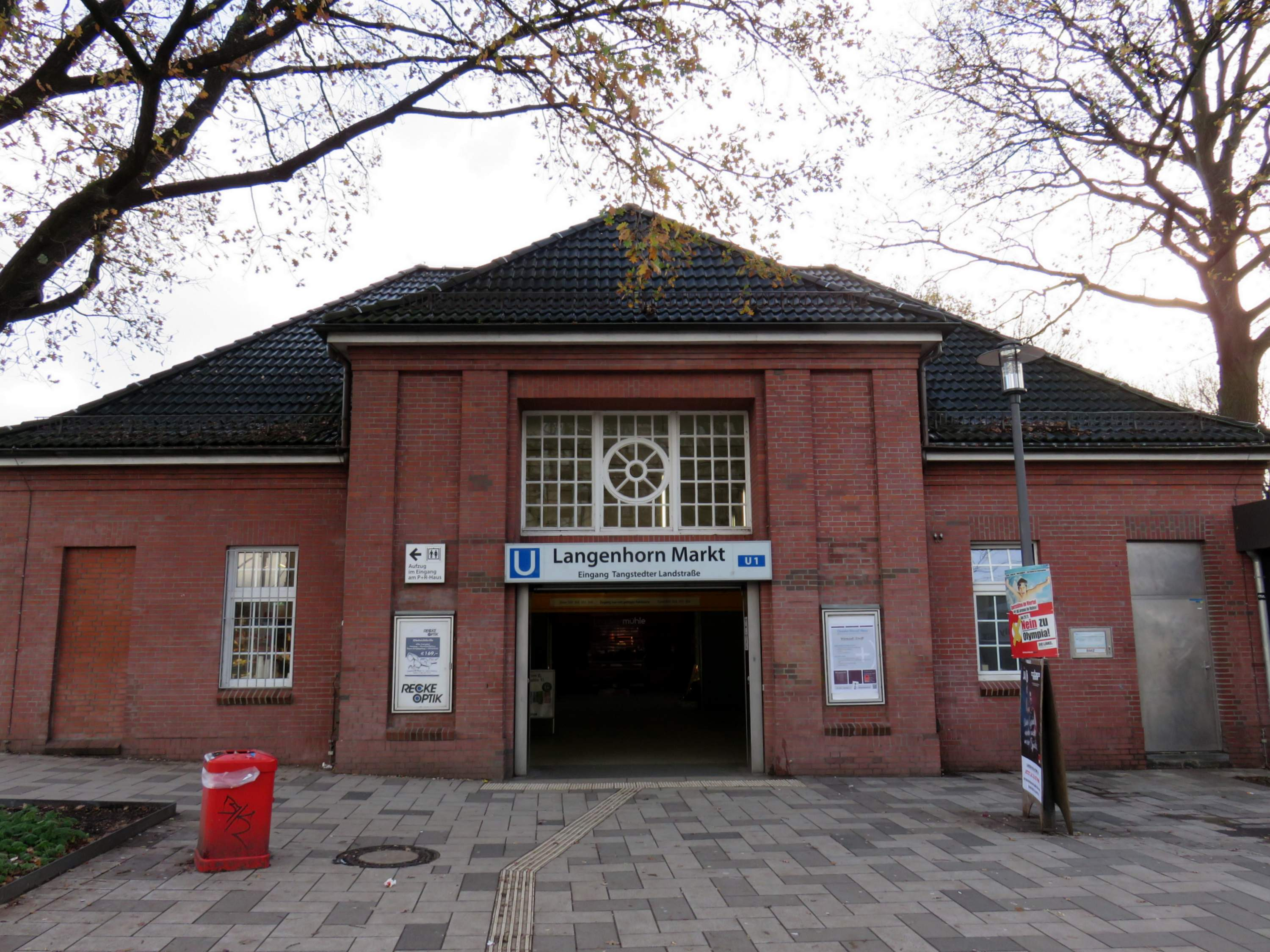 Bahnhof Langenhorn-Markt der U-Bahn-Linie U1 in Hamburg-Langenhorn.